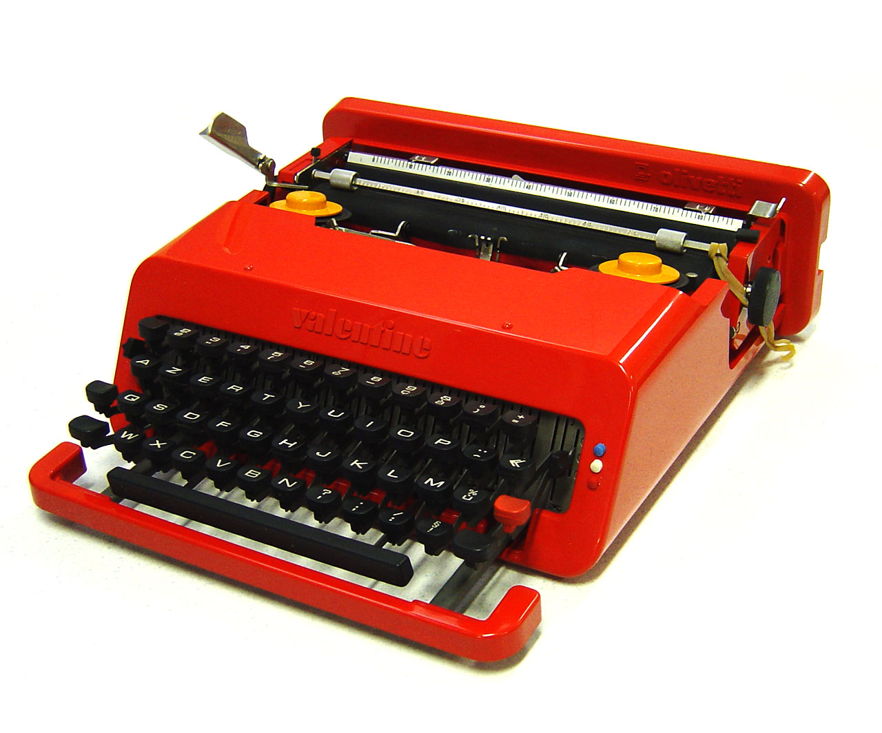 Olivetti Valentine S (1969) Design: Ettore Sottsass, Perry A. King Licenza: by-sa 2.5 (IT). Foto: Davide Casali, Alessandro Gabbiadini, Marcello Mainardi.